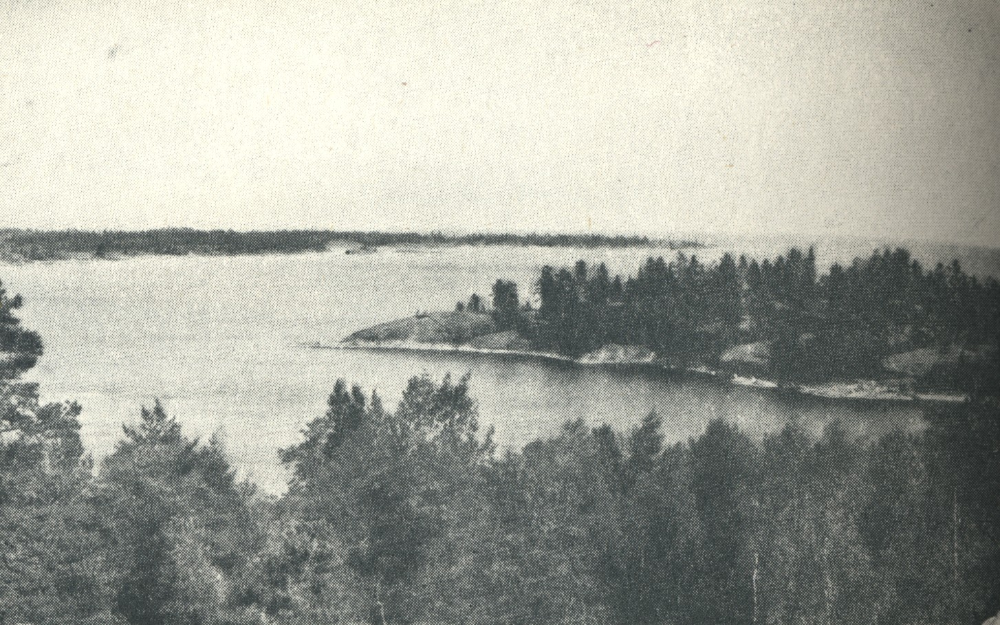 Description